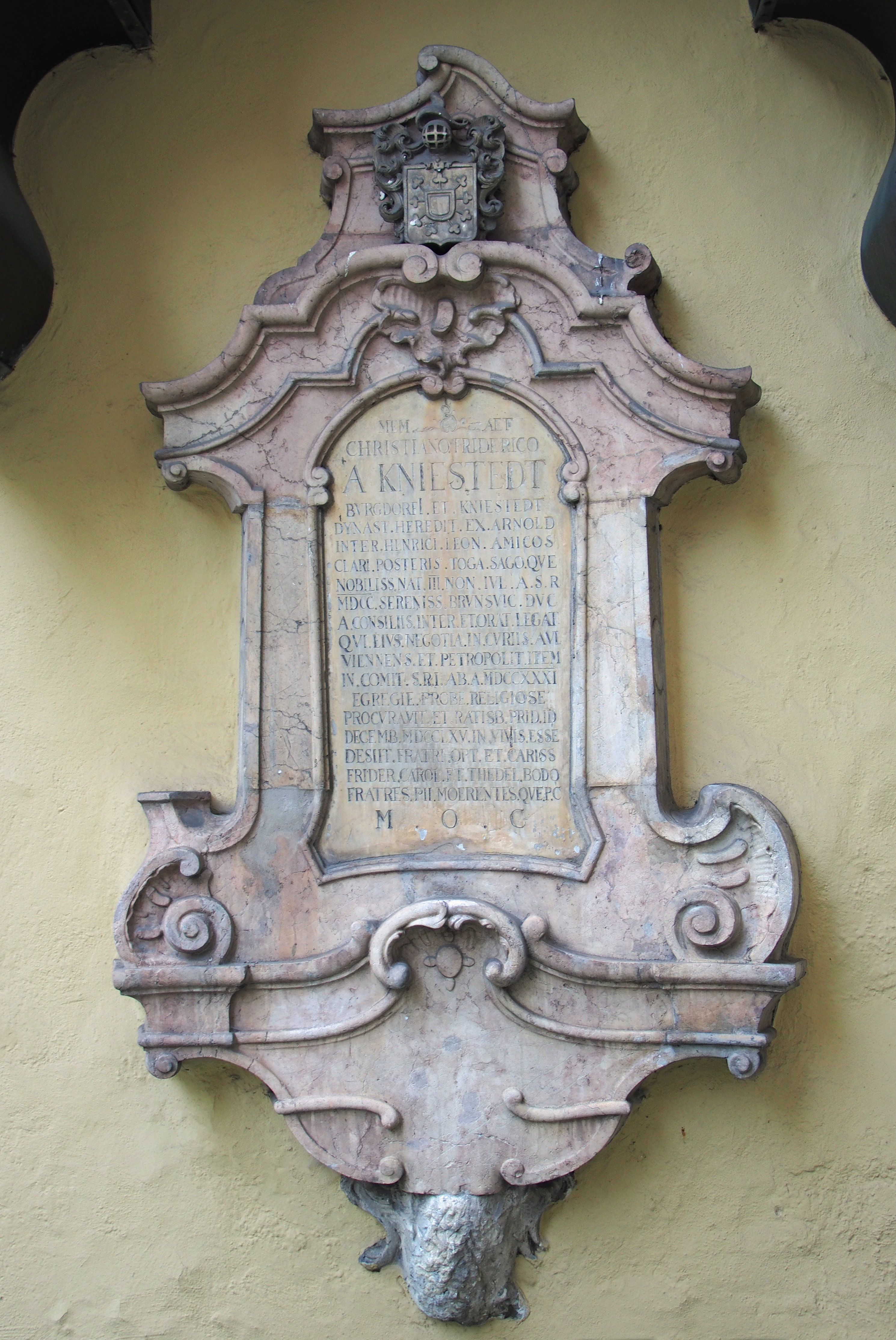 Epitaph Christian Friedrich Freiherr von Kniestedt († 12. Dezember 1765), Geheimer Rat und Comitialgesandter von Braunschweig-Wolfenbüttel. Auf dem Gesandtenfriedhof an der Dreieinigkeitskirche Regensburg (Ostseite)